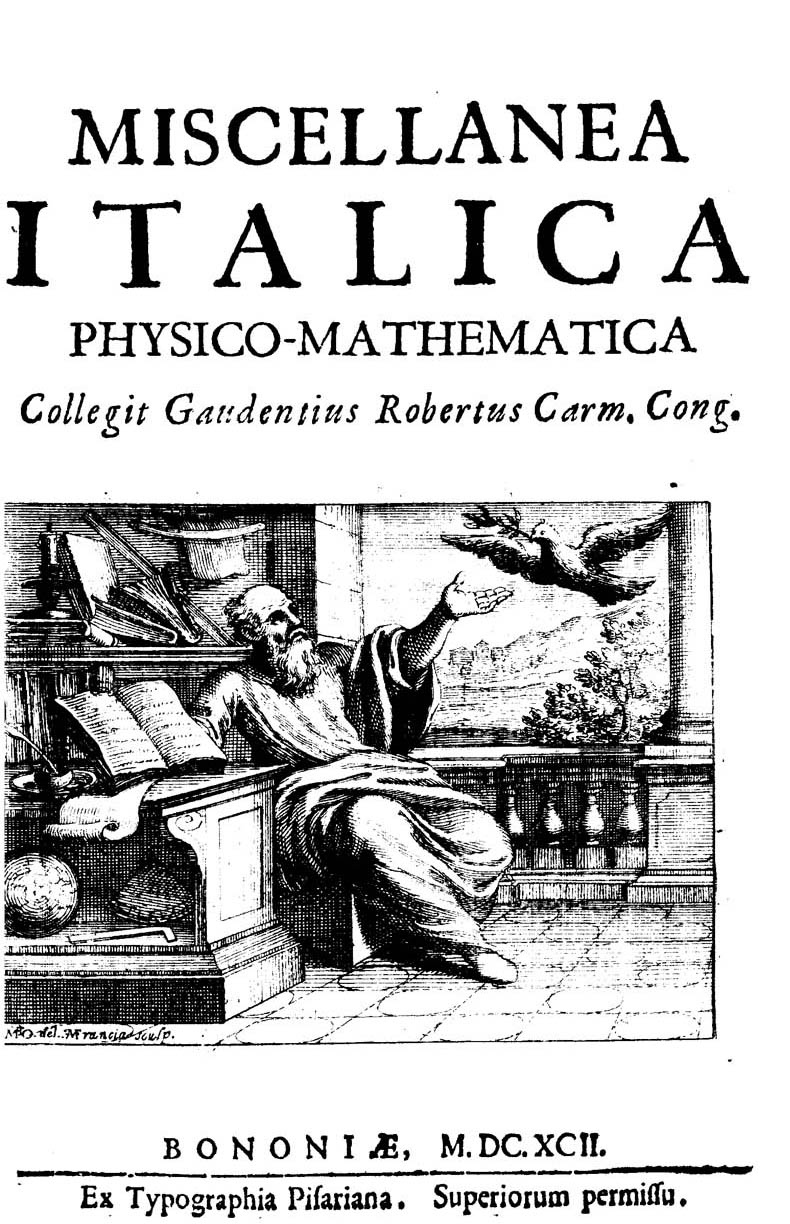 Miscellanea italica physico-mathematica collegit Gaudentius Robertus. - Bononiae : ex Typographia Pisariana, 1692. - [16], 646, [2] p., [13] c. di tav. in pt. ripieg. : ill. ; 4º. - Contiene: Aquarum fluentium mensura noua methodo inquisita / auctore Dominico Gulielmino … -- De sphaera et solidis sphaeralibus libri duo : in quibus Archimedis doctrina de sphaera & cylindro denuo componitur, latiùs promouetur, et in omni specie solidorum, quae vel circa, vel intra sphaeram, ex conuersione poligonorum regularium gigni possint, vniuersalis propagatur / auctore Euangelista Torricellio … -- De terraemotu libellus Flaminij de Mezauachis … : in quo curiosa aperitur terraemotus doctrina & agitur de terraemotu anni 1672 -- De solaribus hypothesibus et refractionibus epistolae tres / auctore Joanne Dominico Cassino -- Theoria motus cometae anni MDCLXIV : ea praeferens, quae ex primis obseruationibus ad futurorum motuum praenotionem deduci potuere, cun noua inuestigationis methodo, tum in eodem, tum in comete nouissimo anni MDCLXV ad praxim reuocata / auctore Joanne Dominico Cassino … -- Cometes Bononiae observatus anno 1664 & 1665 : astronomicophysica dissertatio Geminiani Montanarii … -- De cometis anni 1664, 1665, 1680, 1681 & 1682 epistolae & alia opuscula diuersorum auctorum [Bongiovane, Montanari, Cellio, Ponteo] -- Dominici Gulielmini … Epistolae duae hydrostaticae : altera apologetica aduersus obseruationes contra Mens. Aquarum fluentium a … Dionisio Papino factas & Act. Erud. Lipsiae anni 1691 insertas, altera de velocitate & motu fluidorum in siphonibus recuruis suctorijs -- Noua experimenta physico-mechanica pro demonstranda genuina causa eleuationis aquae & mercurij supra solitam eorum libellam in vitreis fistulis Torricellianis / auctore Matthaeo Campano .